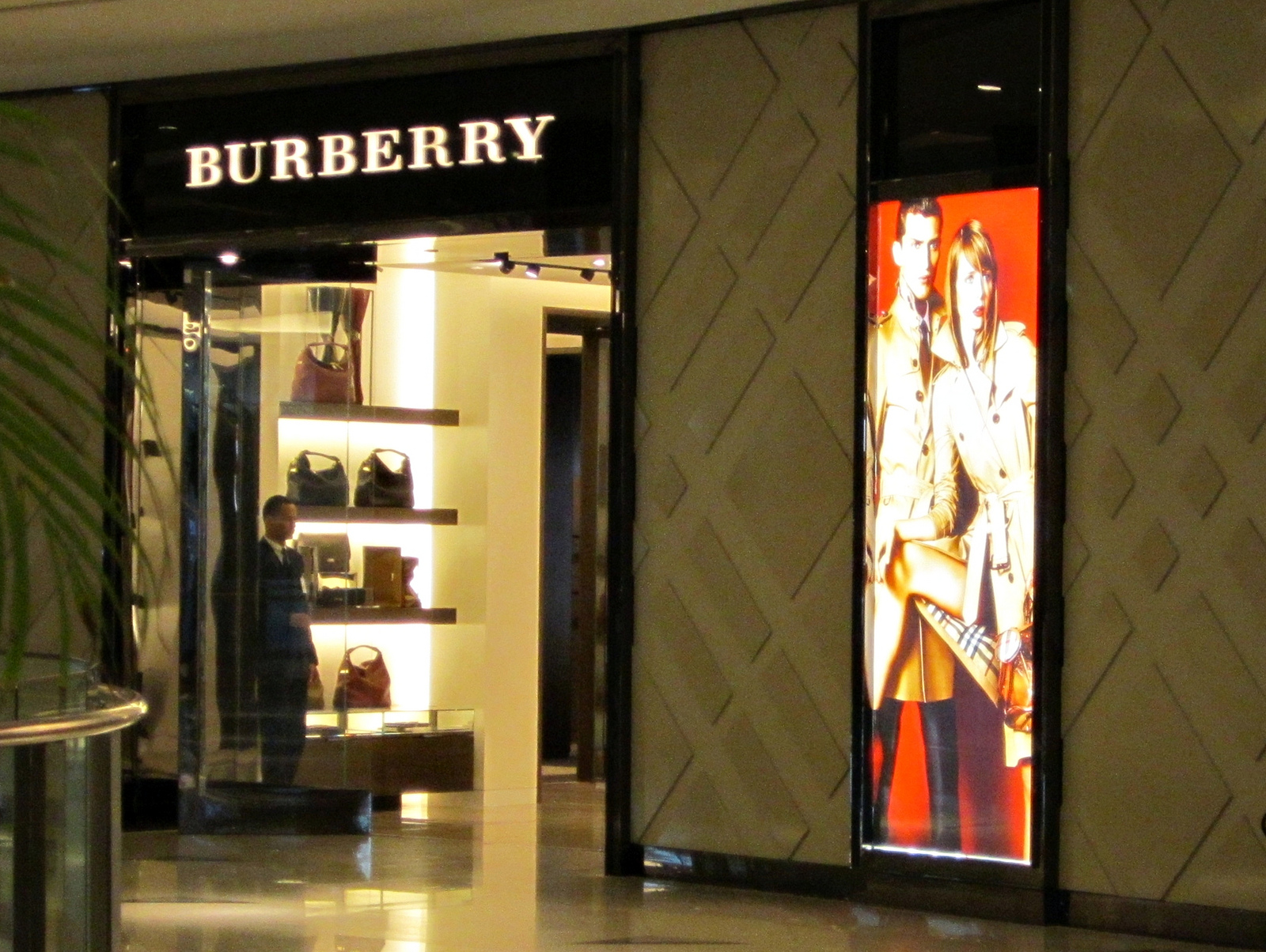 Burberry no RioMar Shopping - Recife, Pernambuco, Brasil